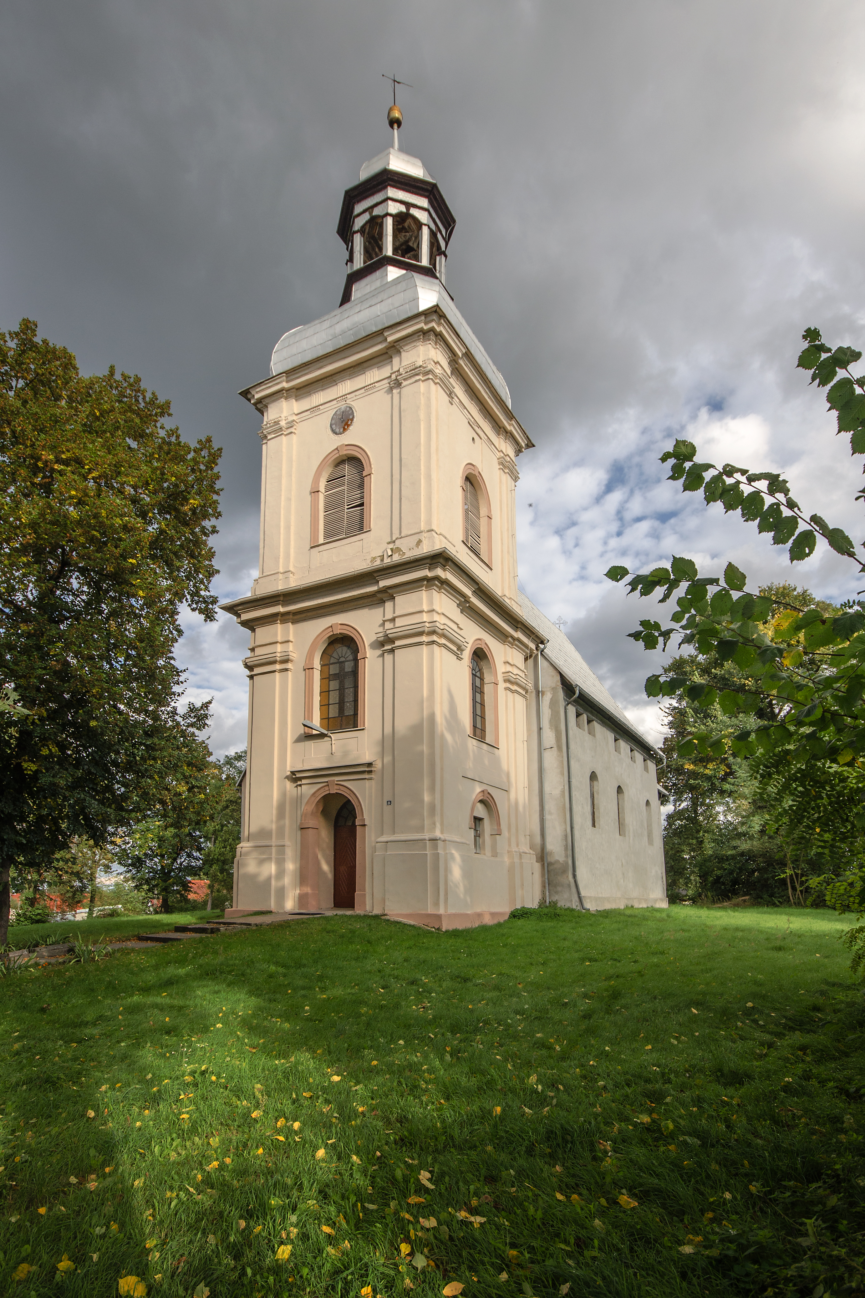 Masłów - dawny kościół ewangelicki, obecnie rzymskokatolicki filialny p.w. Najświętszej Maryi Panny Nieustającej Pomocy, 1592, 1710